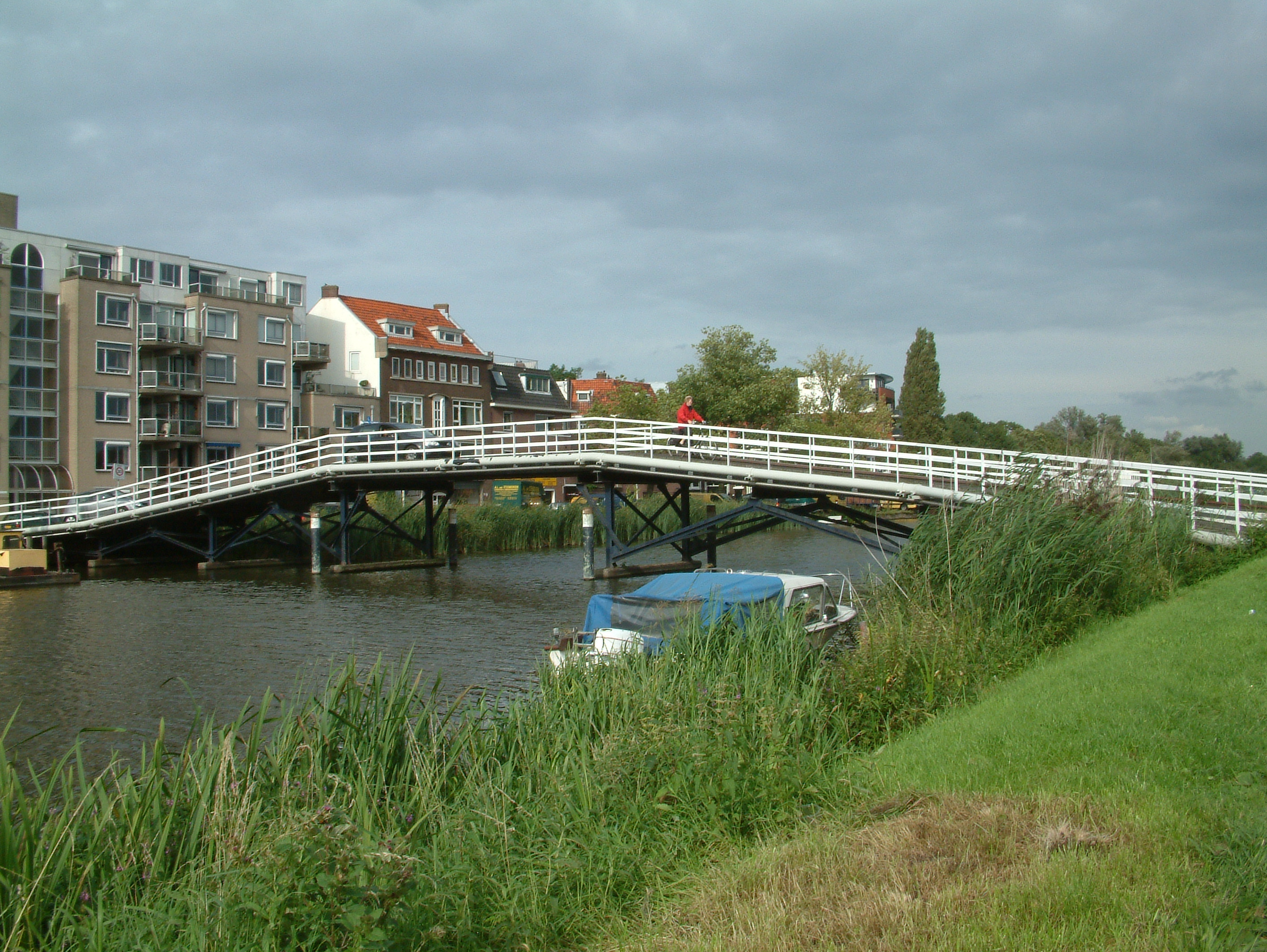 De Prins Willembrug over de Rotte